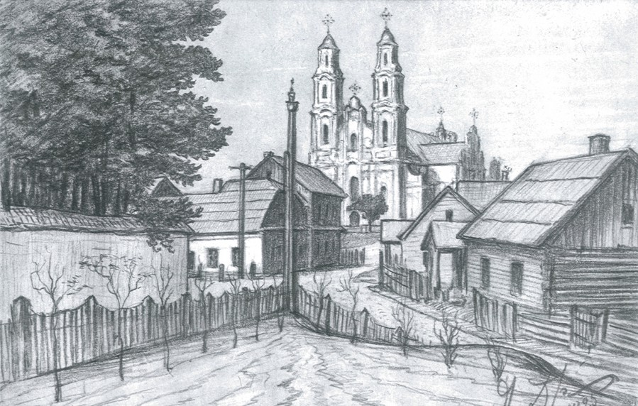 Беларуская (тарашкевіца): Глыбокае (Hłybokaje), пляц Рынак (plac Rynak)